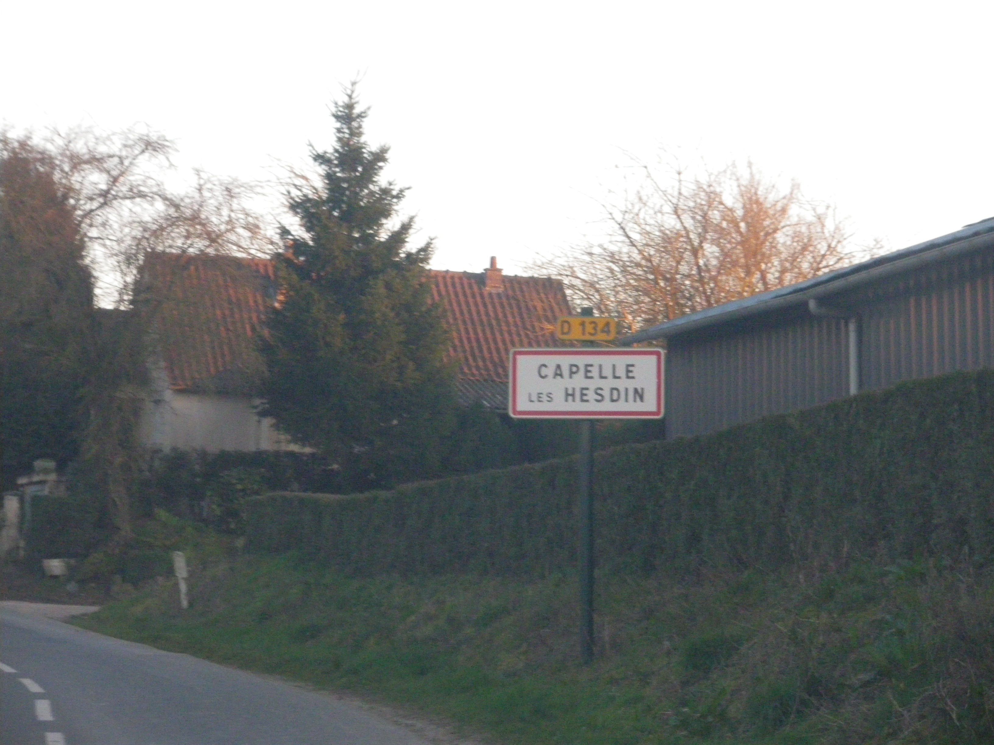 Panneau d'entrée de la commune de Capelle-lès-Hesdin.